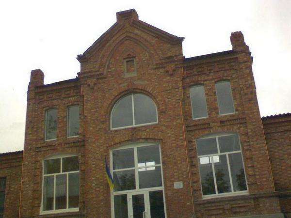 Будинок жіночої прогімназії — тепер Ананьївська центральна районна лікарня